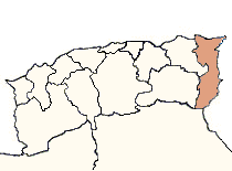 Localisation du département de Bône, 1962.